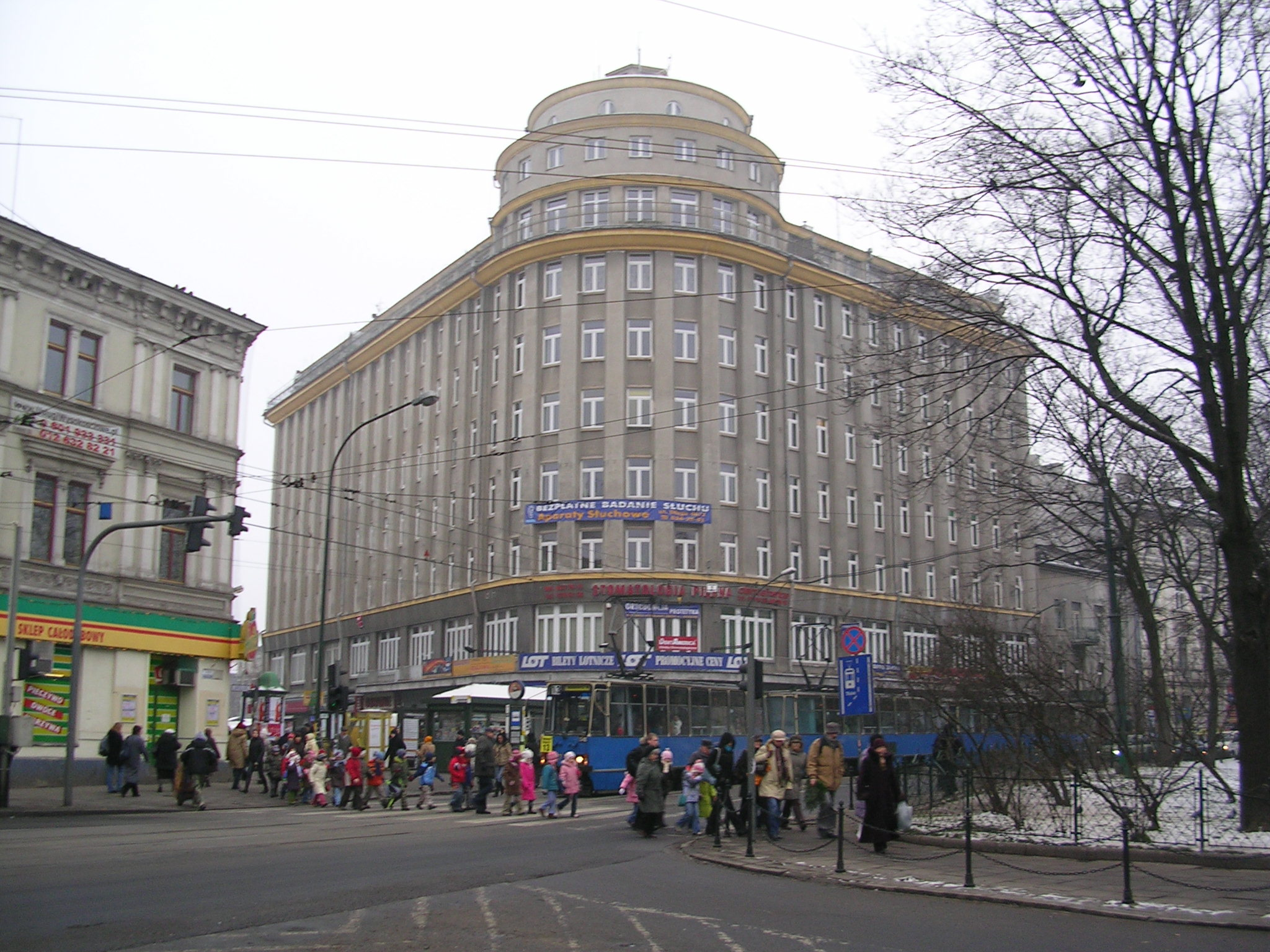 2 dom feniksa z naprzeciwka, building in Kraków